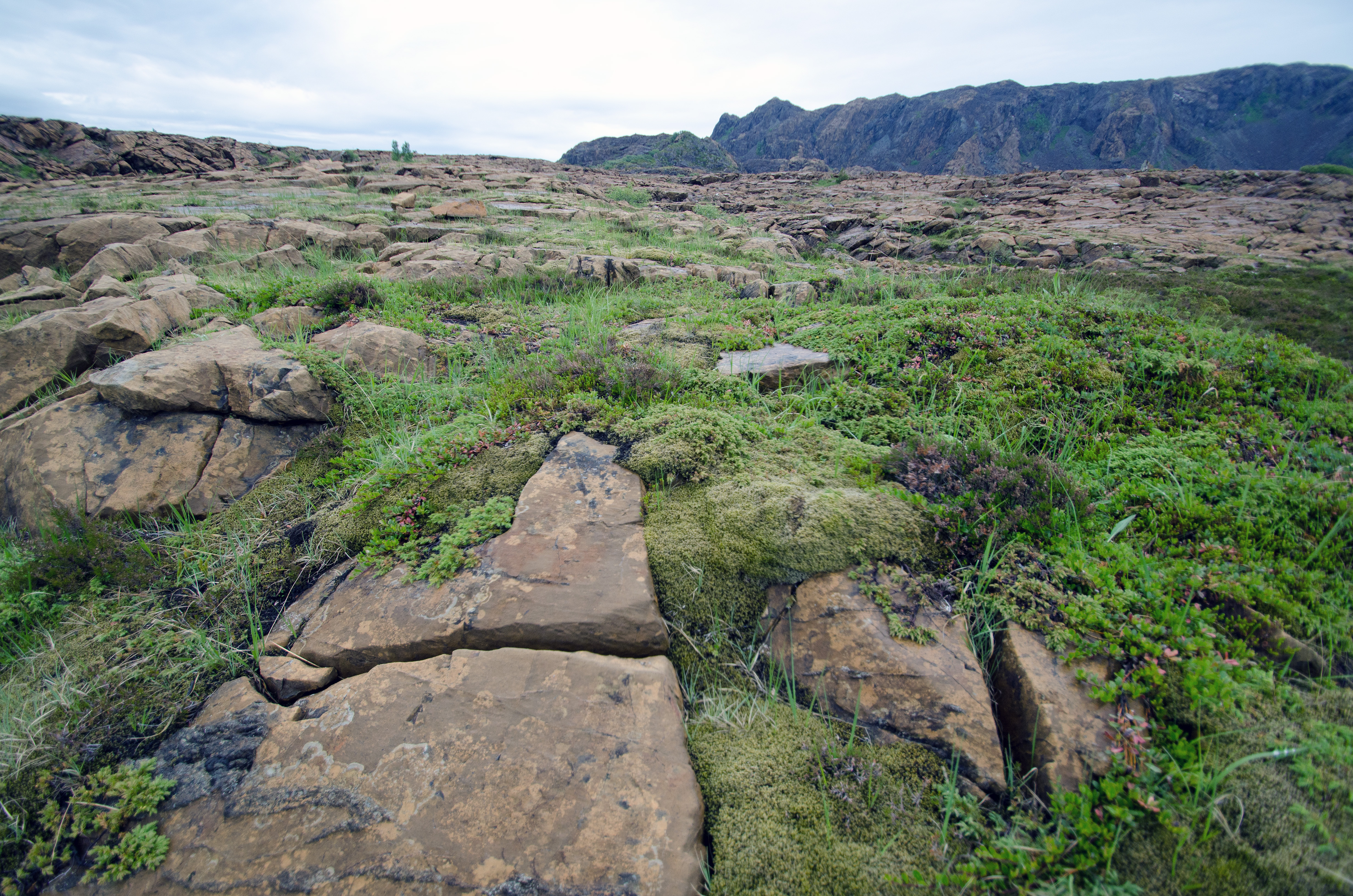 Leka island